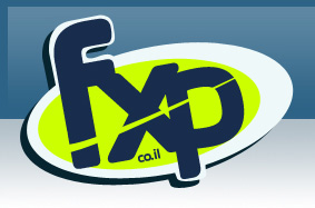 הסמל השני של FXP